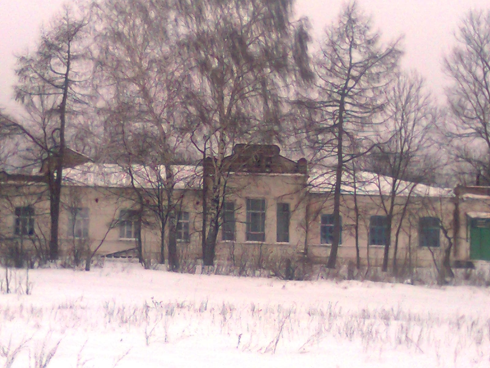 Больница в селе Гагарино Тамбовской области